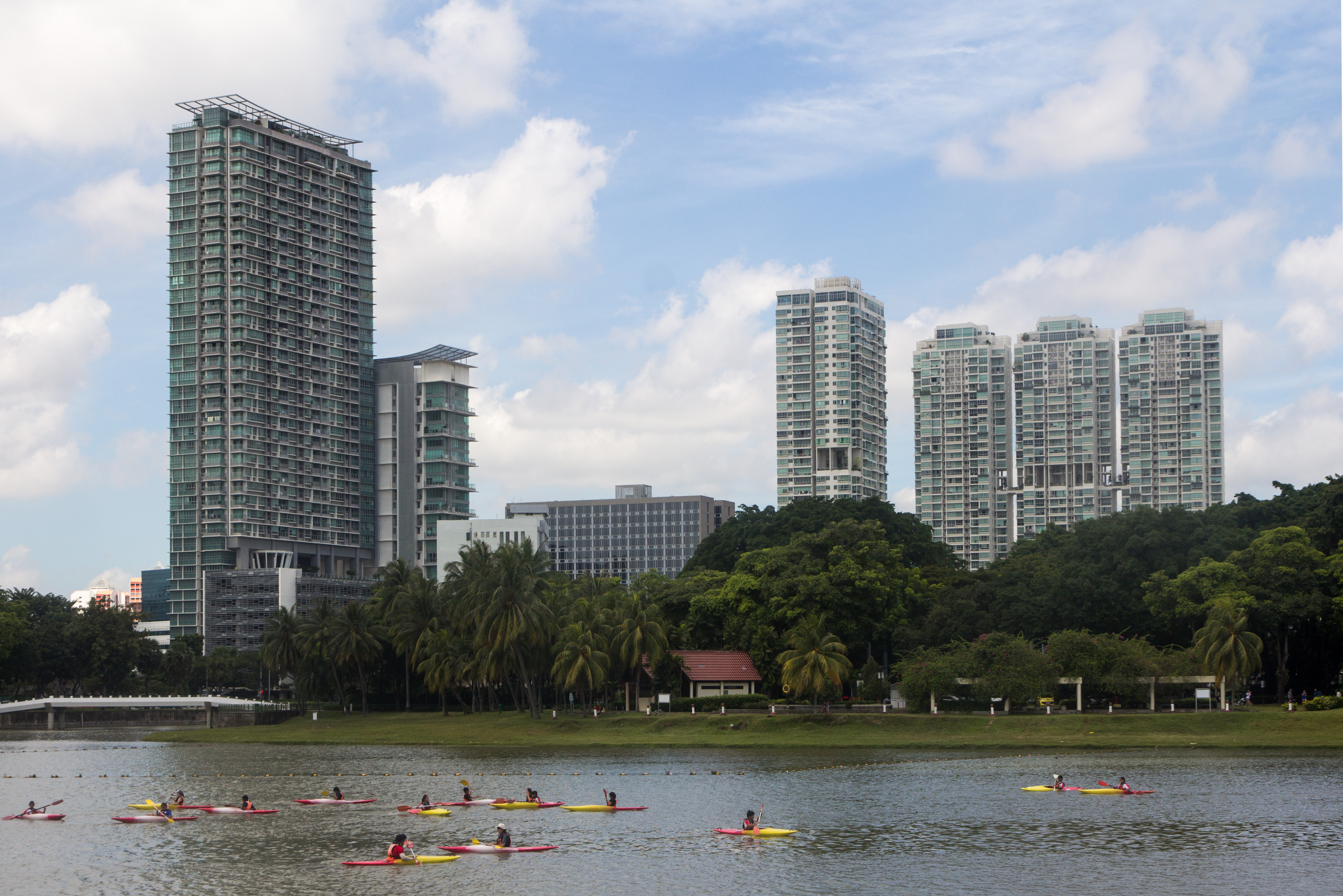 Kallang River